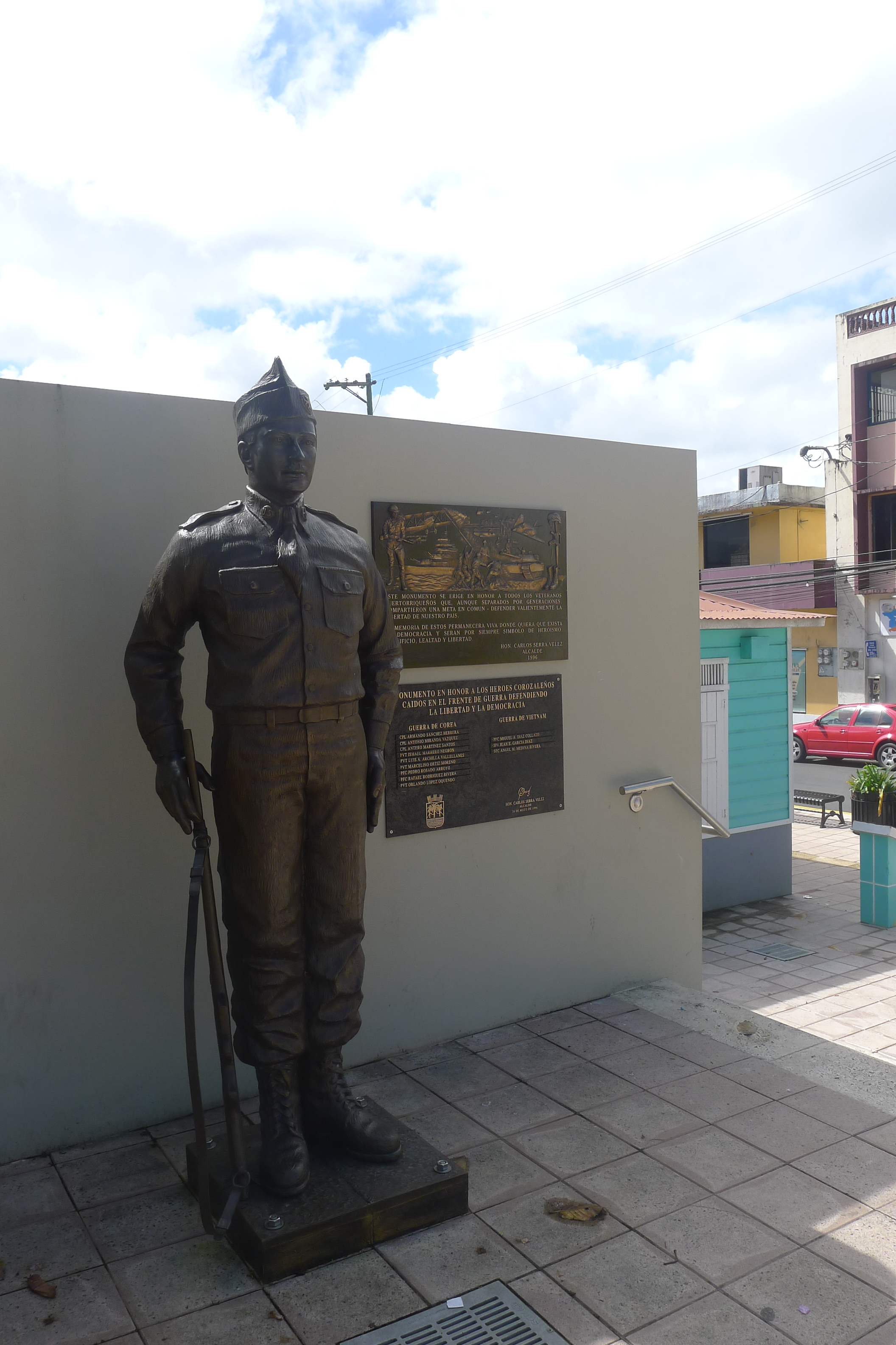 Corozal, 00783, Puerto Rico